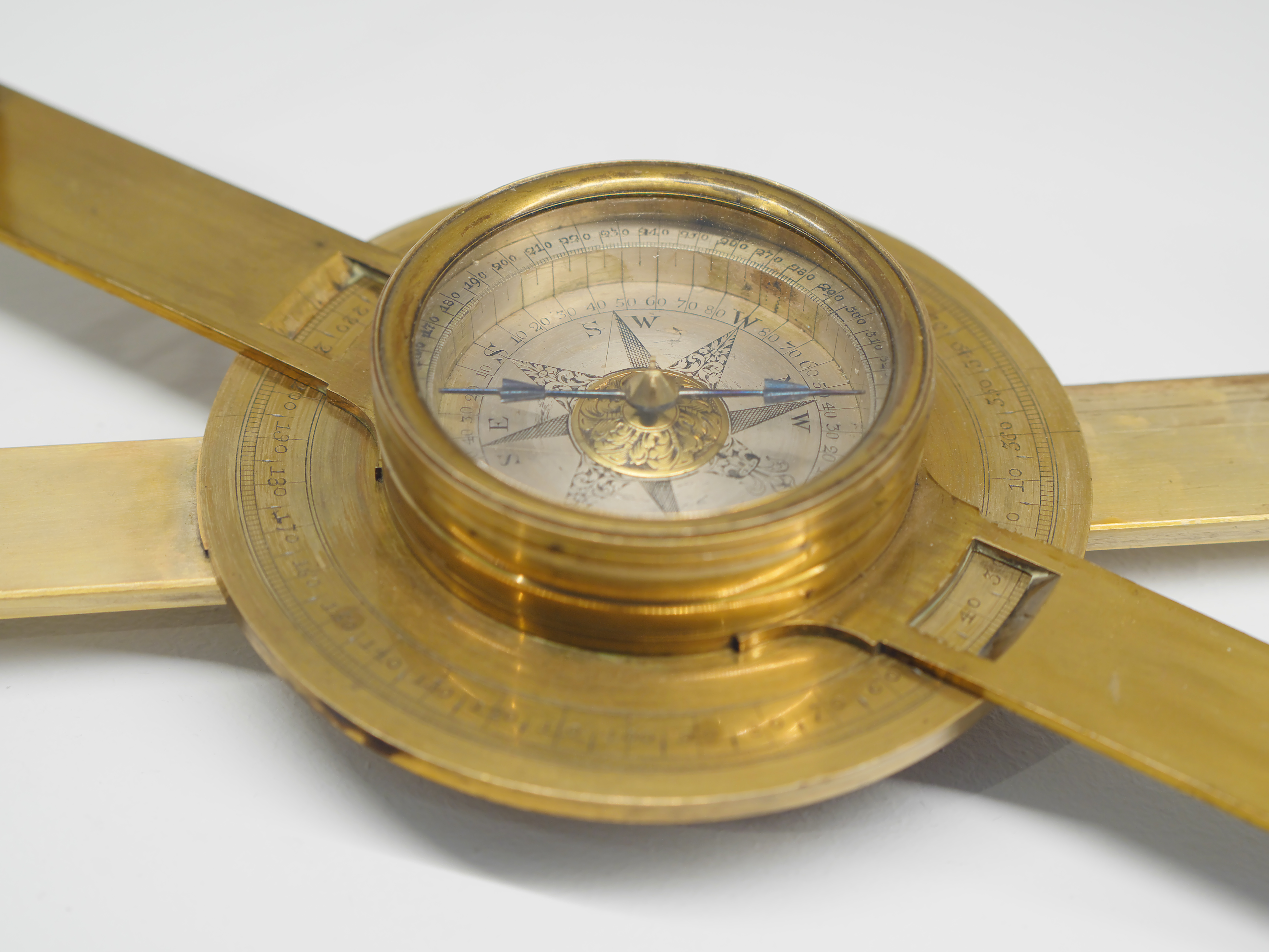 Diopter-Bussole aus Großbritannien um 1760, Exponat der Ausstellung 2017 vom GeoForschungsZentrum Potsdam